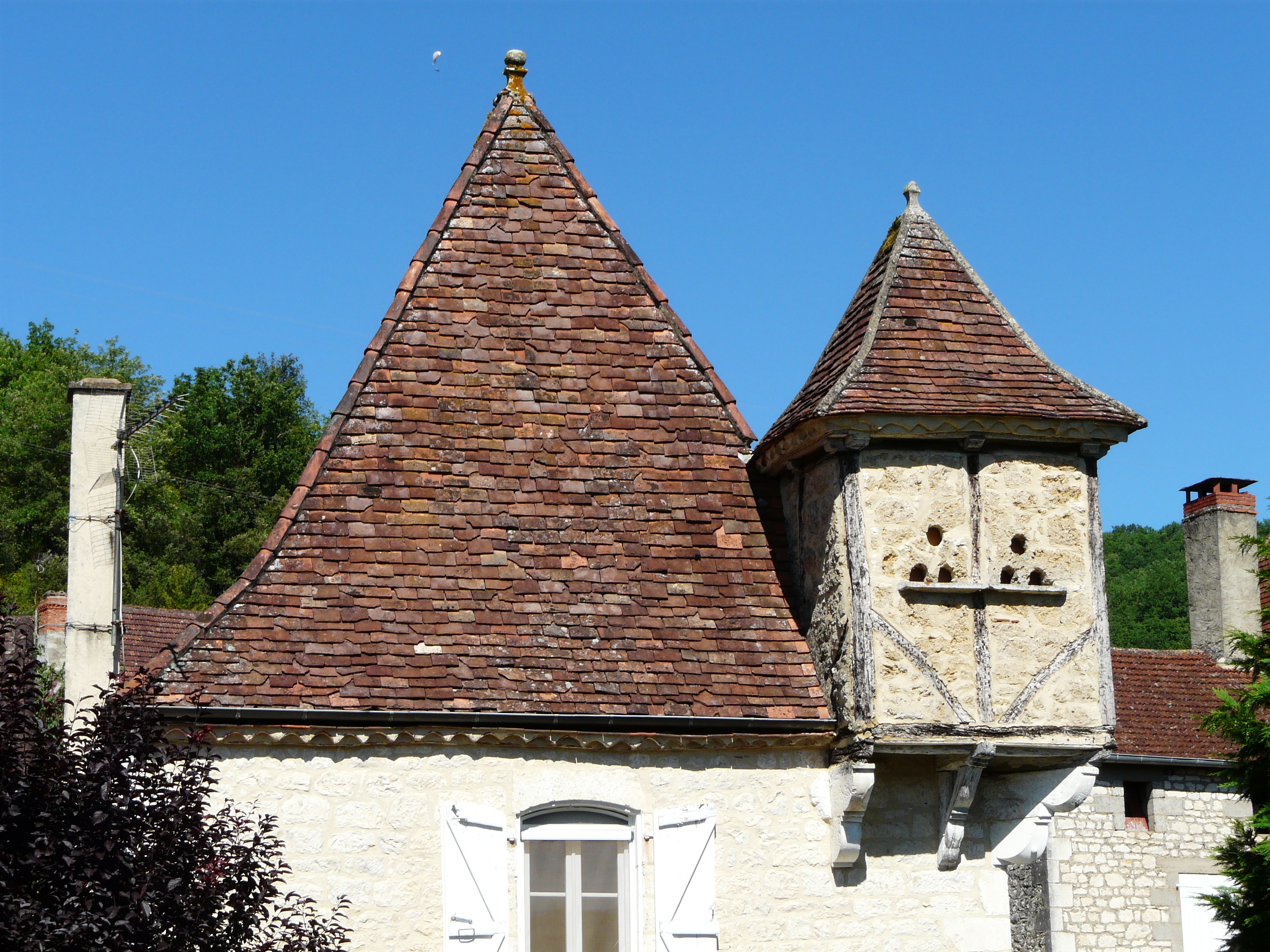 Pigeonnier dans le village de Peyrillac, Peyrillac-et-Millac, Dordogne, France.